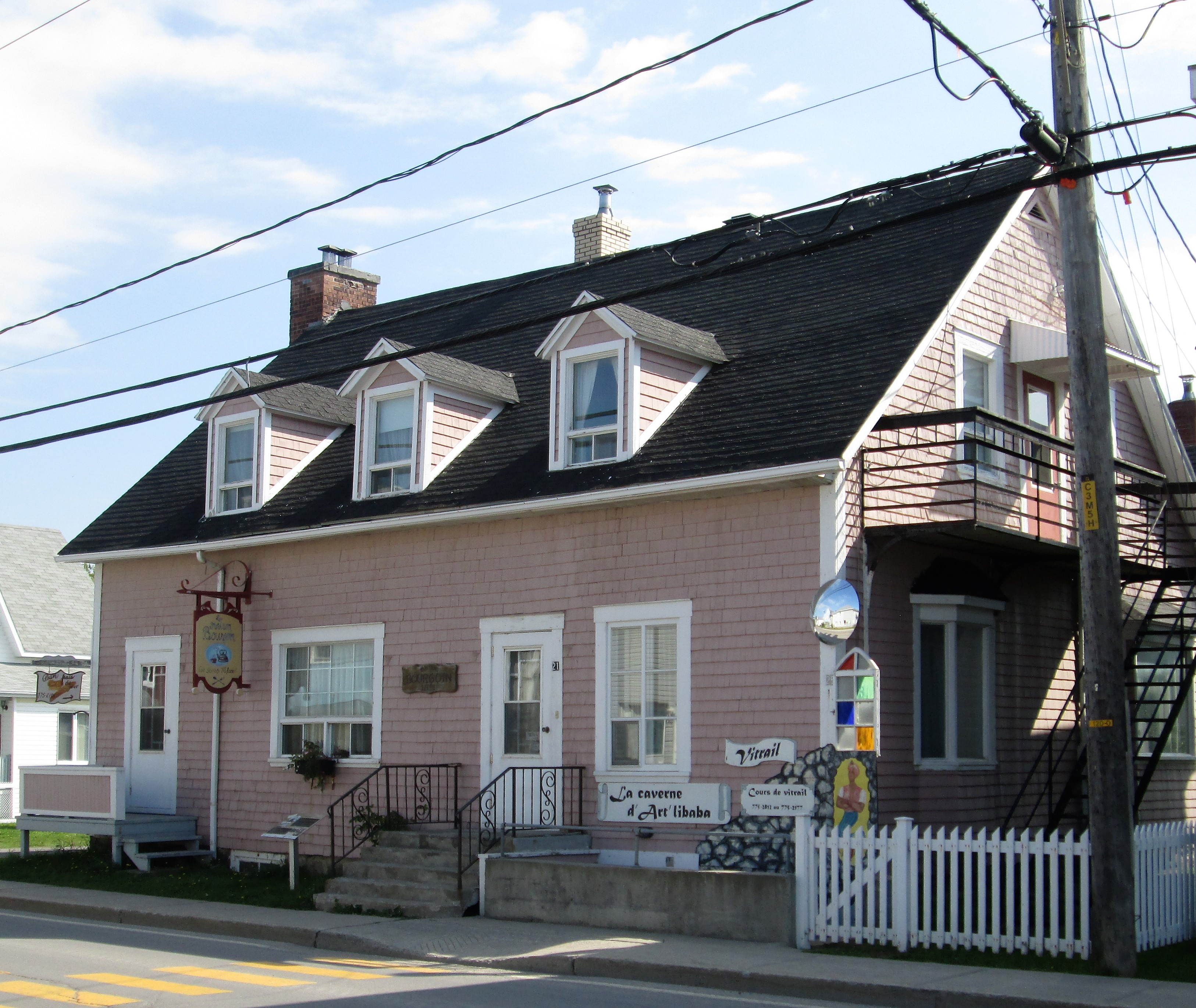 Maison Bourgoin, 21, rue Saint-Rémi, Price (Canada). (Protection MH cité. Voir la liste des lieux patrimoniaux du Bas-Saint-Laurent pour plus de détails).